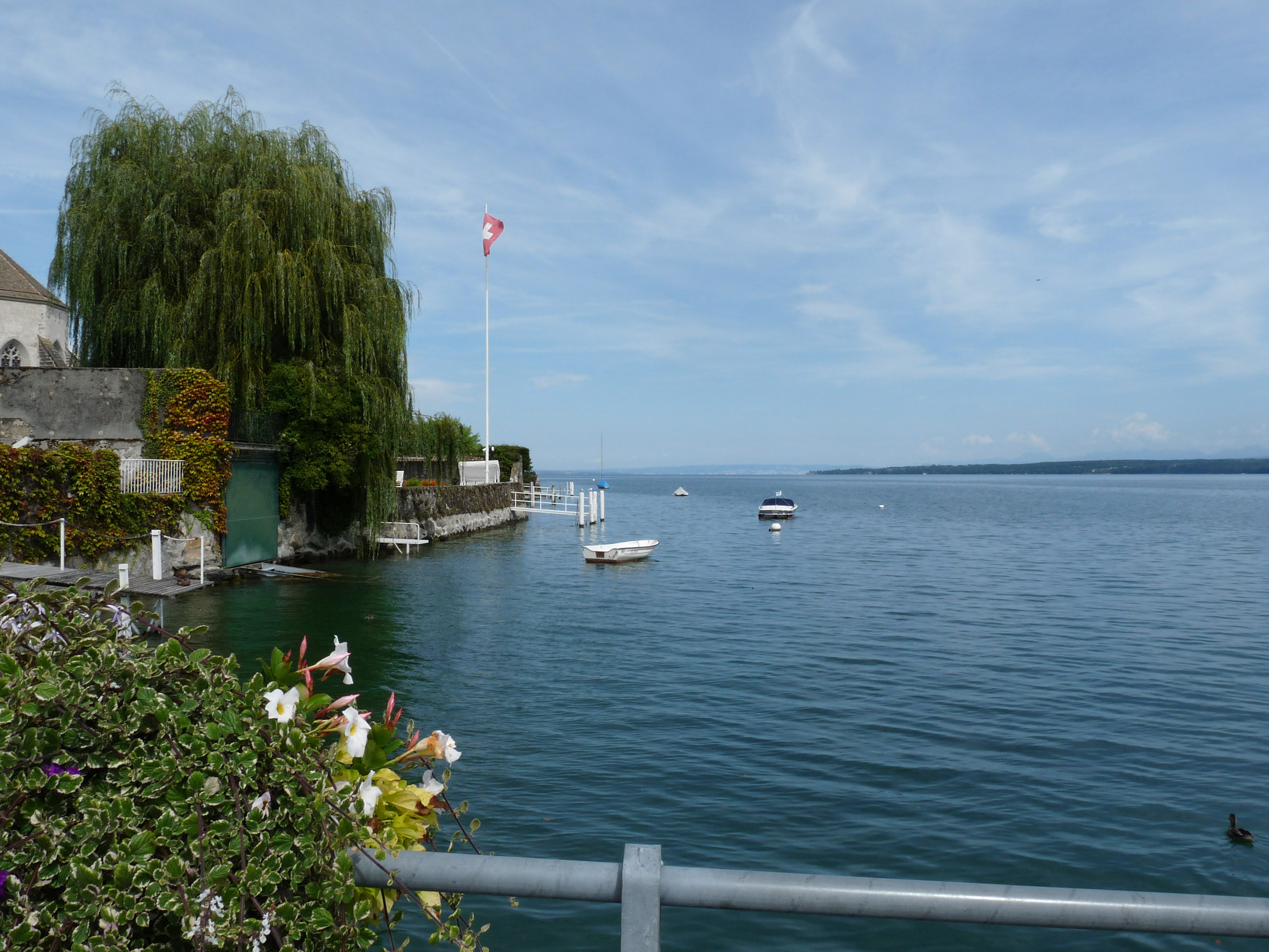 Coppet (canton de Vaud, Suisse) : embarcadère sur le Lac Léman.